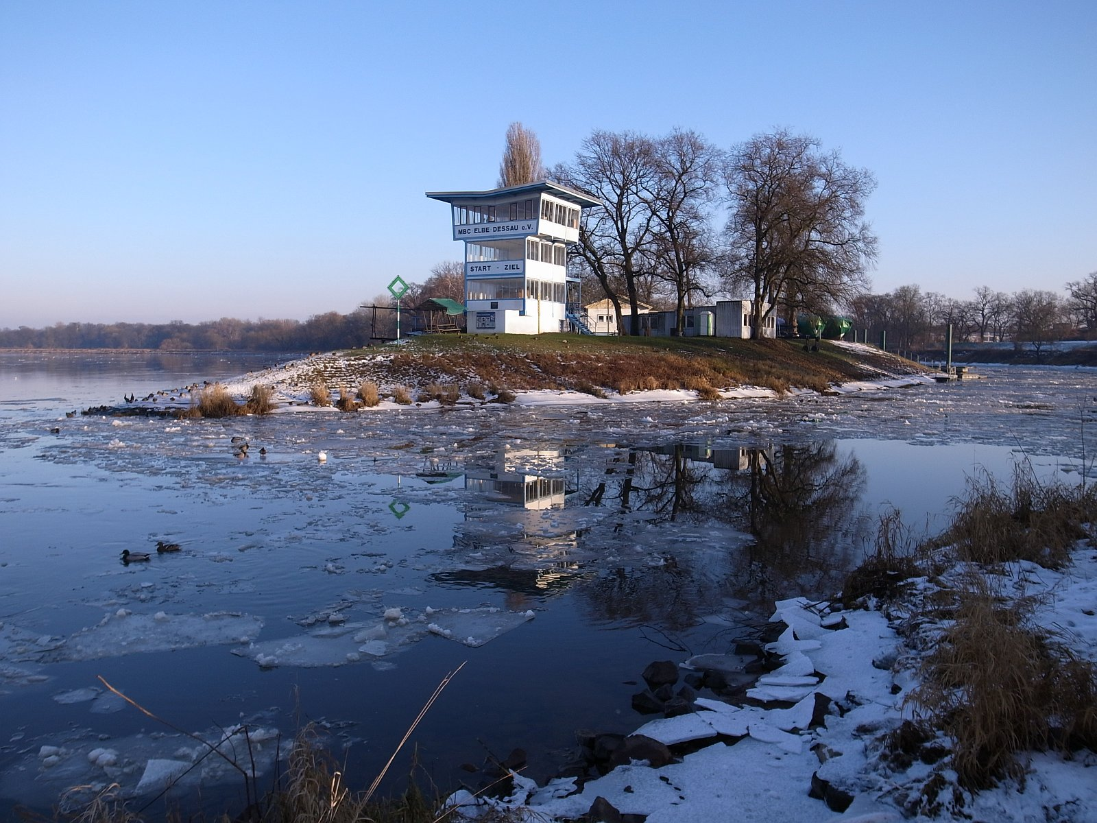 Dessau, Leopoldshafen